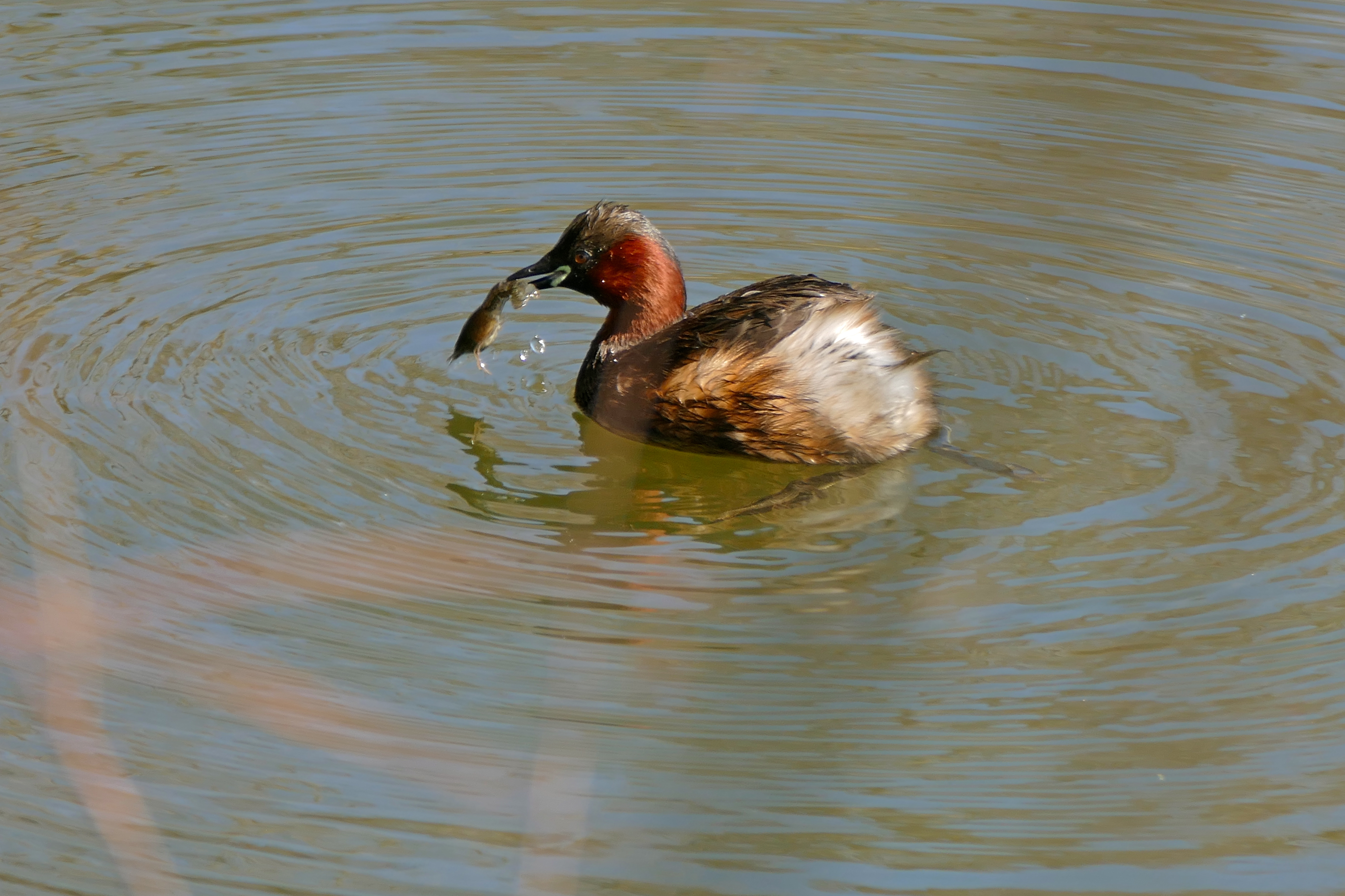 Aguait Quim Franch, Estany del Cortalet, Los Aiguamolls del' Empordà, Castelló d'Empúries, Catalunya, SPAIN